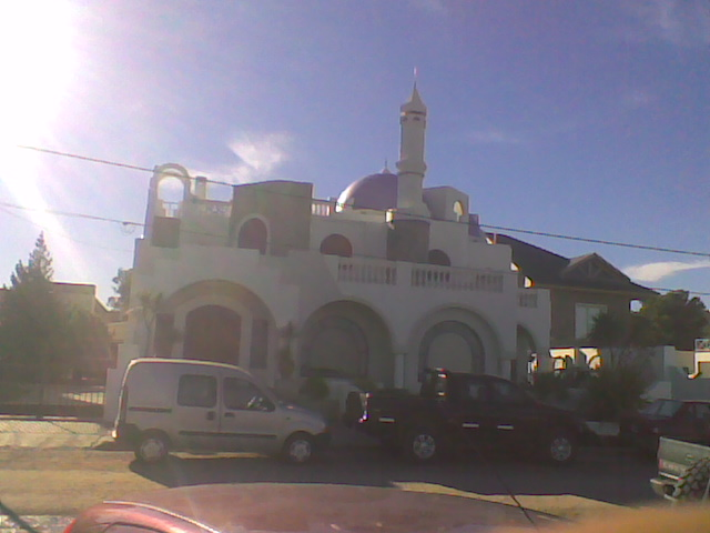 tipica arquitectura de la villa (Esta foto no identifica la arquitectura de la Villa sino que es la única casa con ese formato)